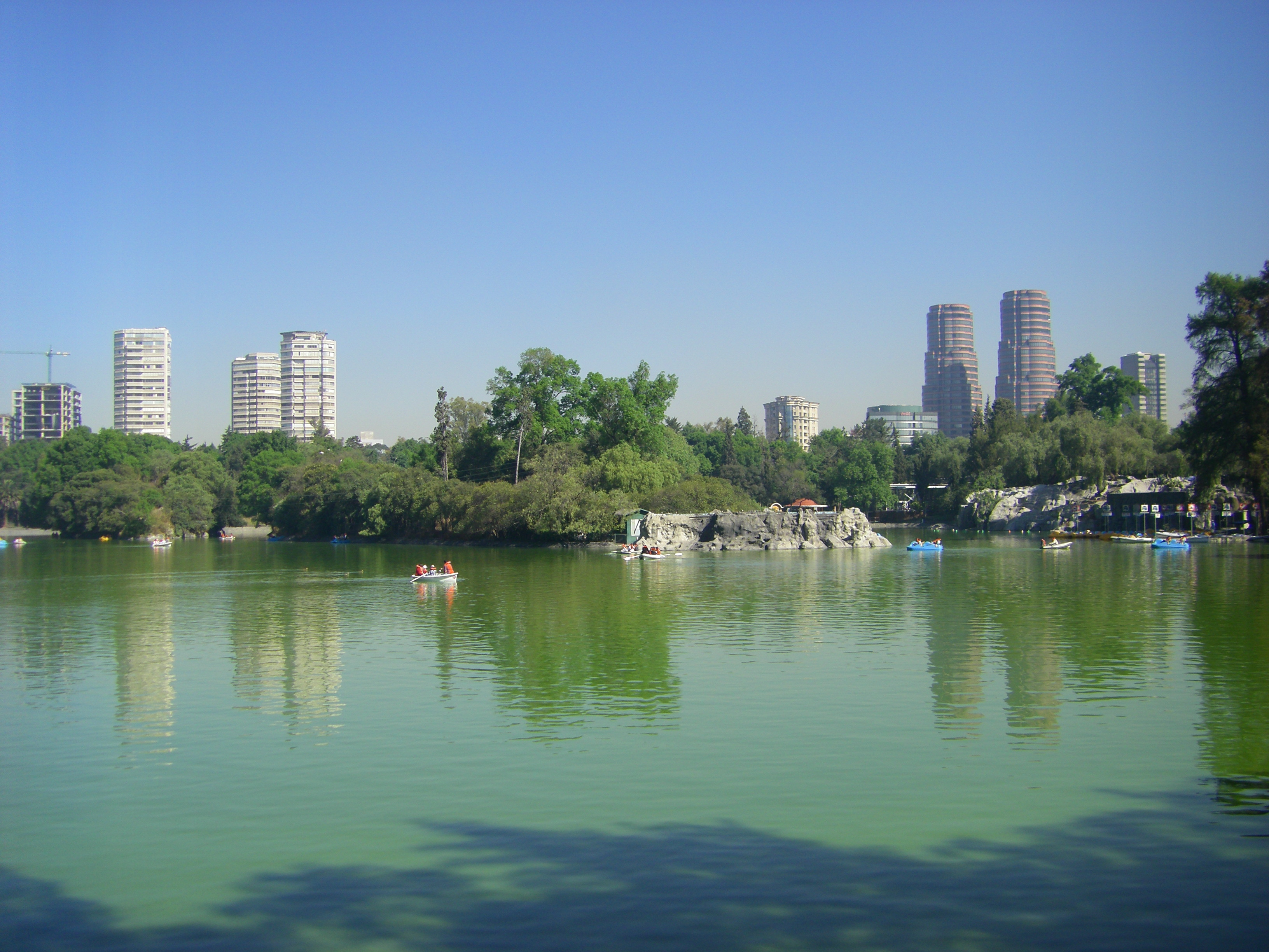 Weiher im Bosque de Chapultepec, Mexiko-Stadt